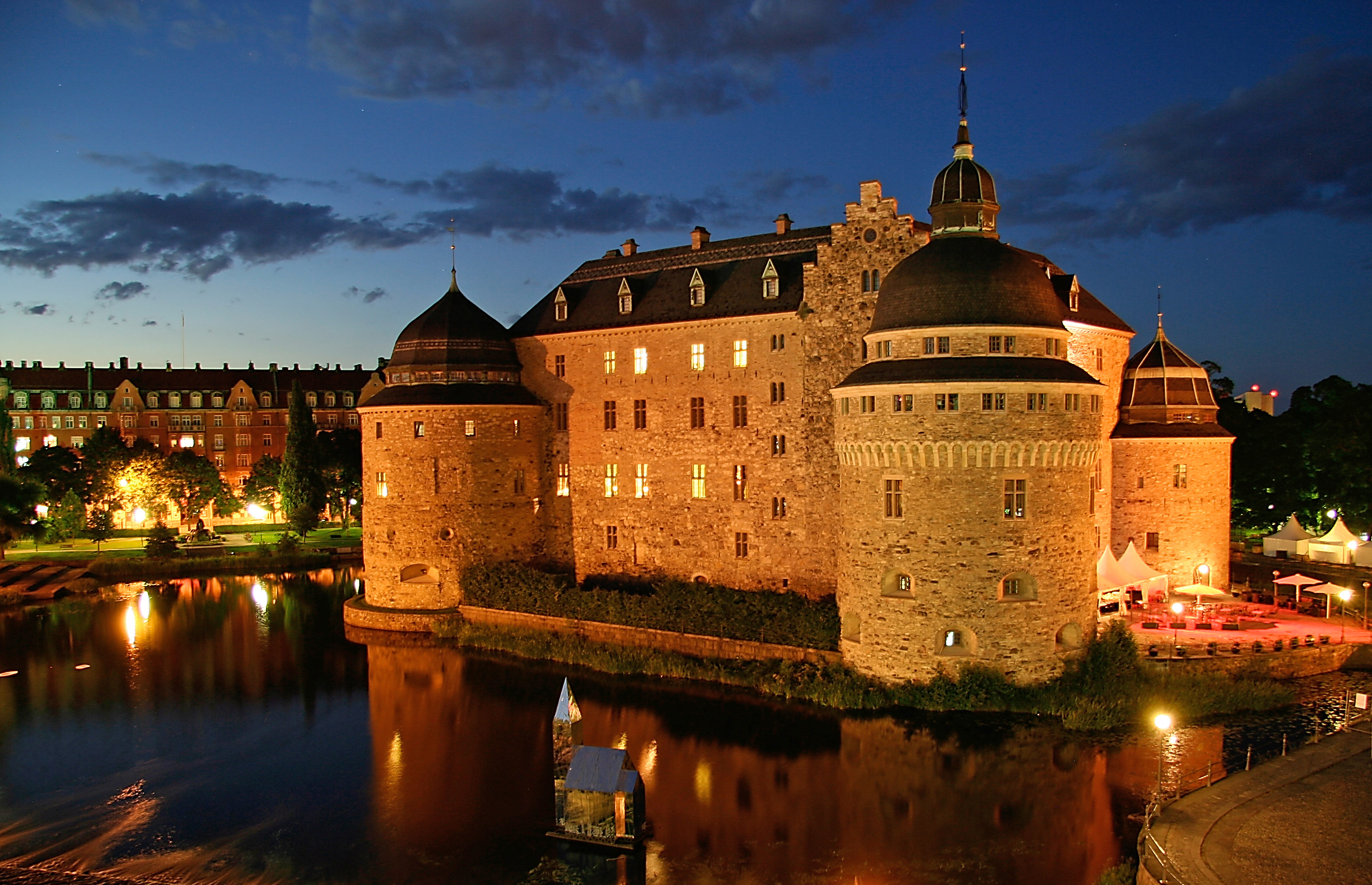 Örebro slott (Nikolai 3:5)